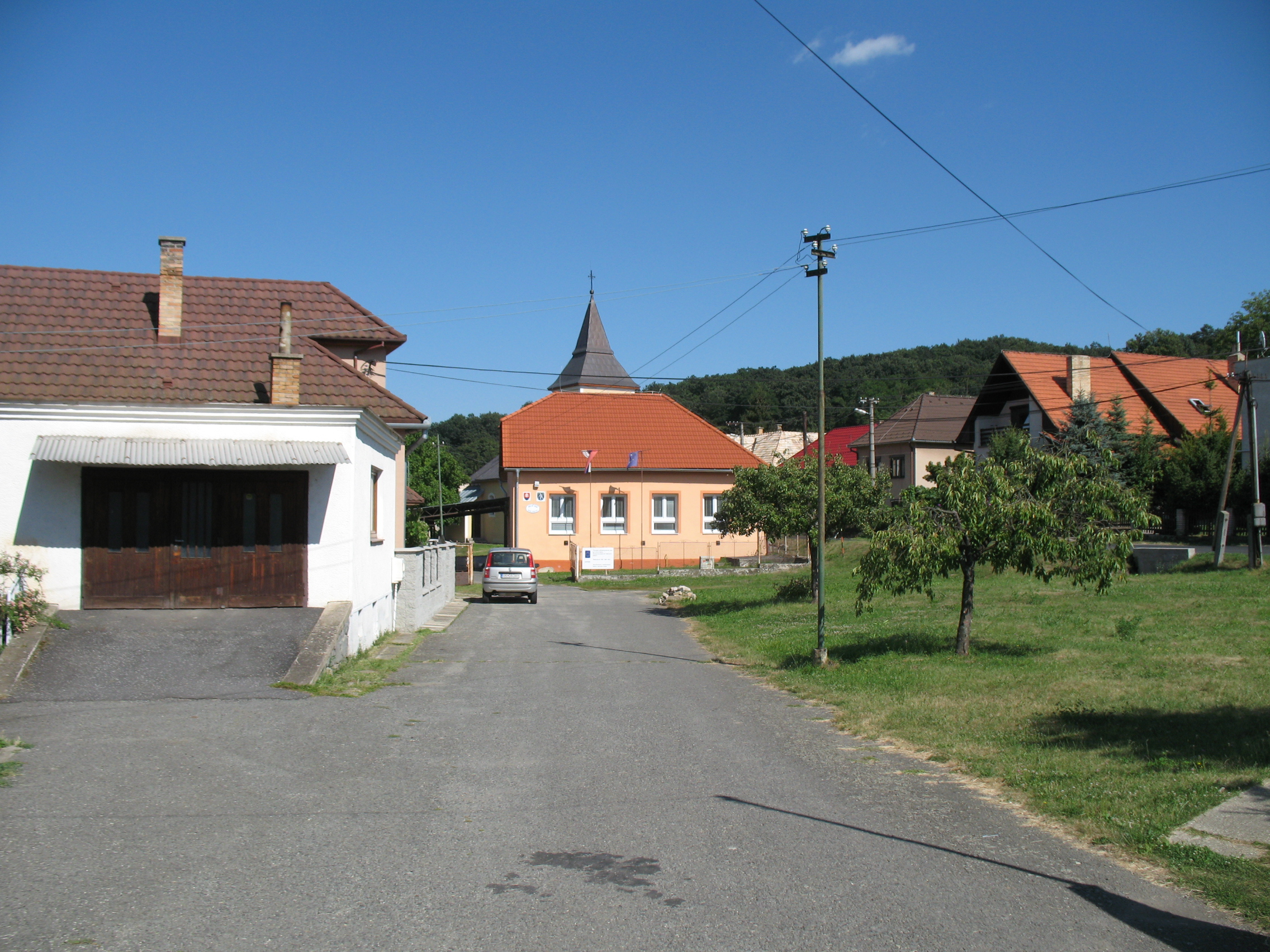 Nagyhalom